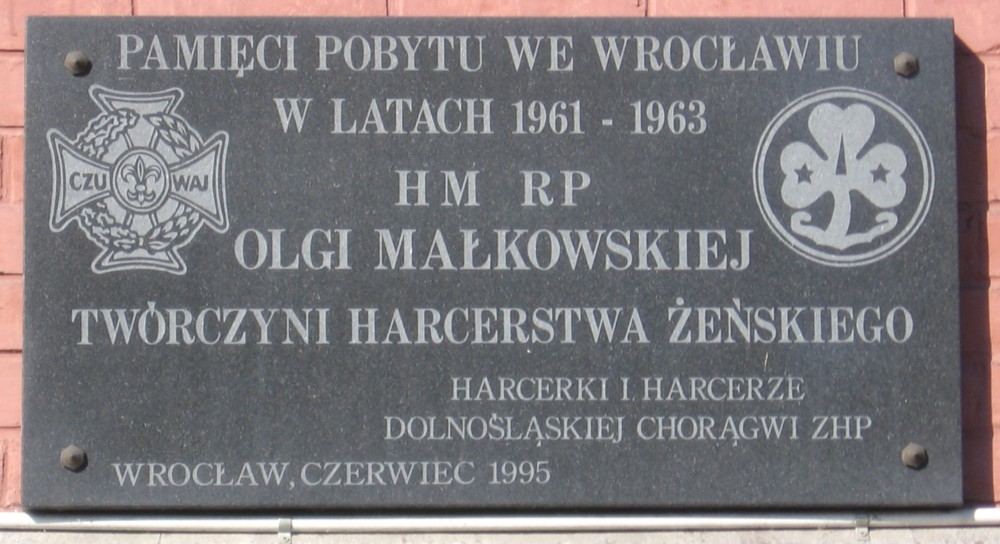 tablica pamiątkowa poświęcona Oldze Małkowskiej na ścianie budynku przy ul. Nowej 6 we Wrocławiu (siedziba Chorągwi Dolnośląskiej ZHP